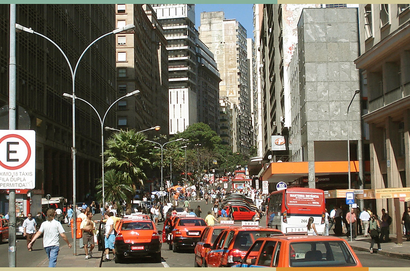 fim da avenida Borges de Medeiros, junto à praça do Mercado e a Prefeitura